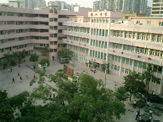 澳門濠江中學內園